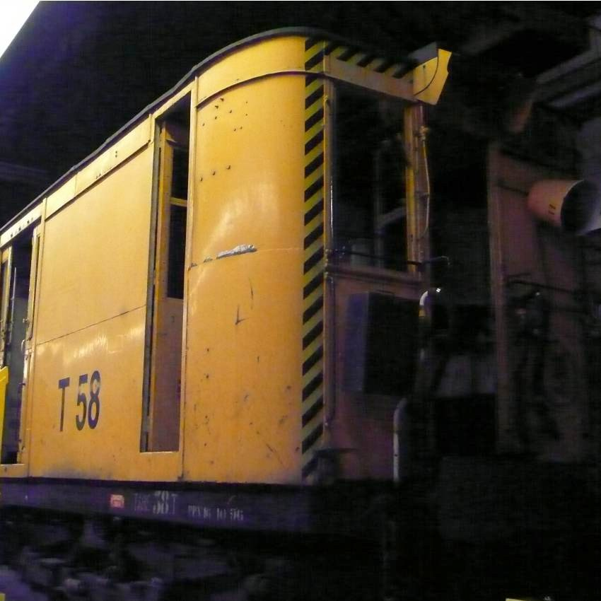 Le T58 aux ateliers de La Villette